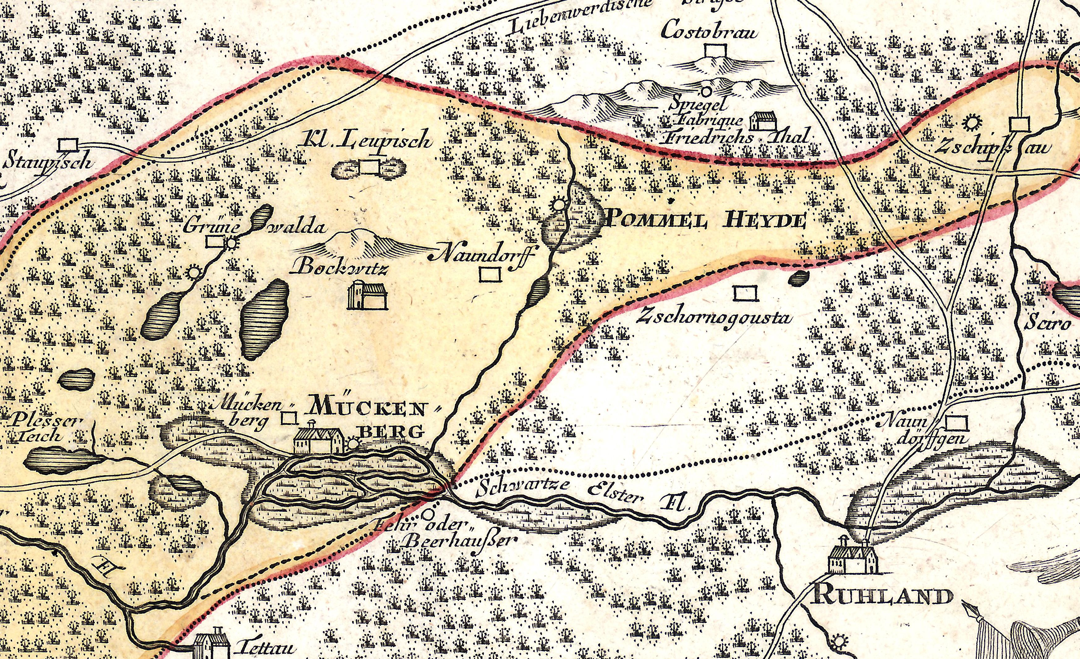 Kursächsisches Amt Grossen Hayn, Kartenausschnitt Region Mückenberg